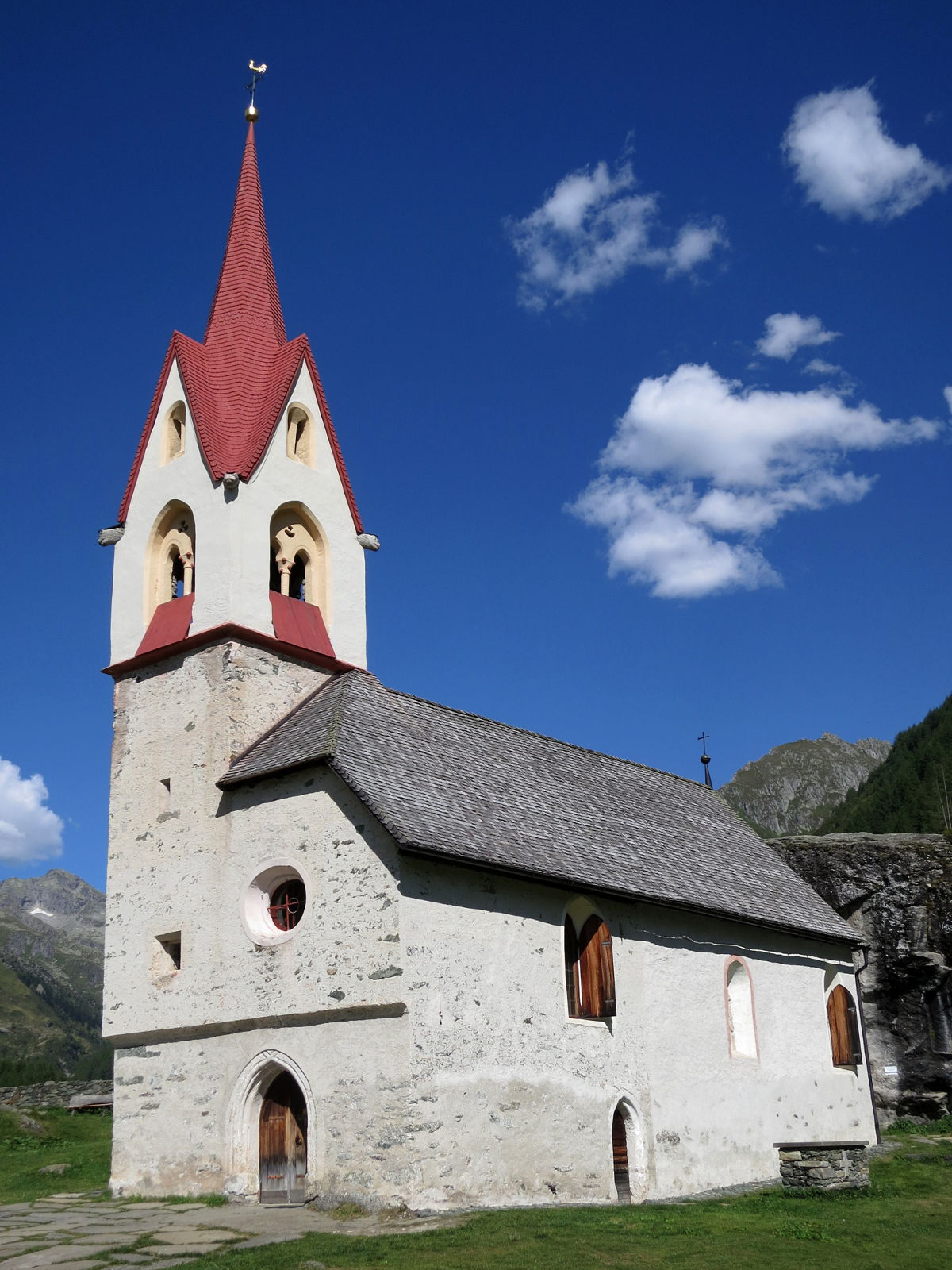 Chapelle du Saint-Esprit, Kasern, Prettau, Trentin-Haut-Adige, Italie